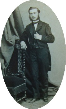 Alfred Riom jeune